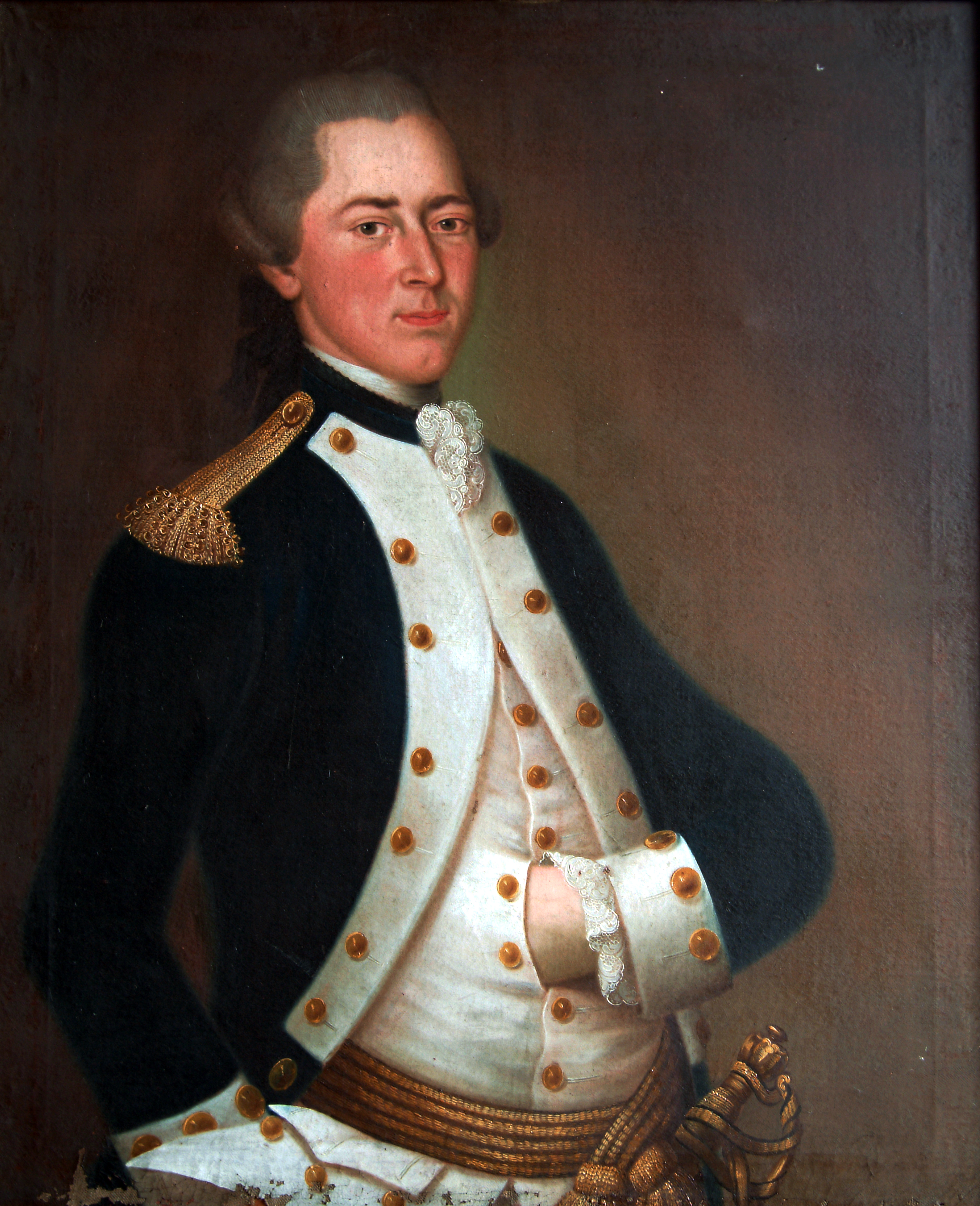 Portrait Clemens Waldburg-Zeil-Lustenau-Hohenems (* 13. August 1753; † 10. März 1817 in Kempten), Gründer der Linie Waldburg-Zeil-Hohenems, Palast Hohenems, Vorarlberg, Österreich